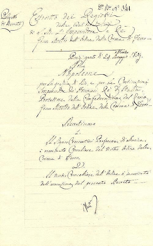 Manoscritto autografo di Napoleone in cui insignisce Crescentini dell'Ordine della Croce di Ferro